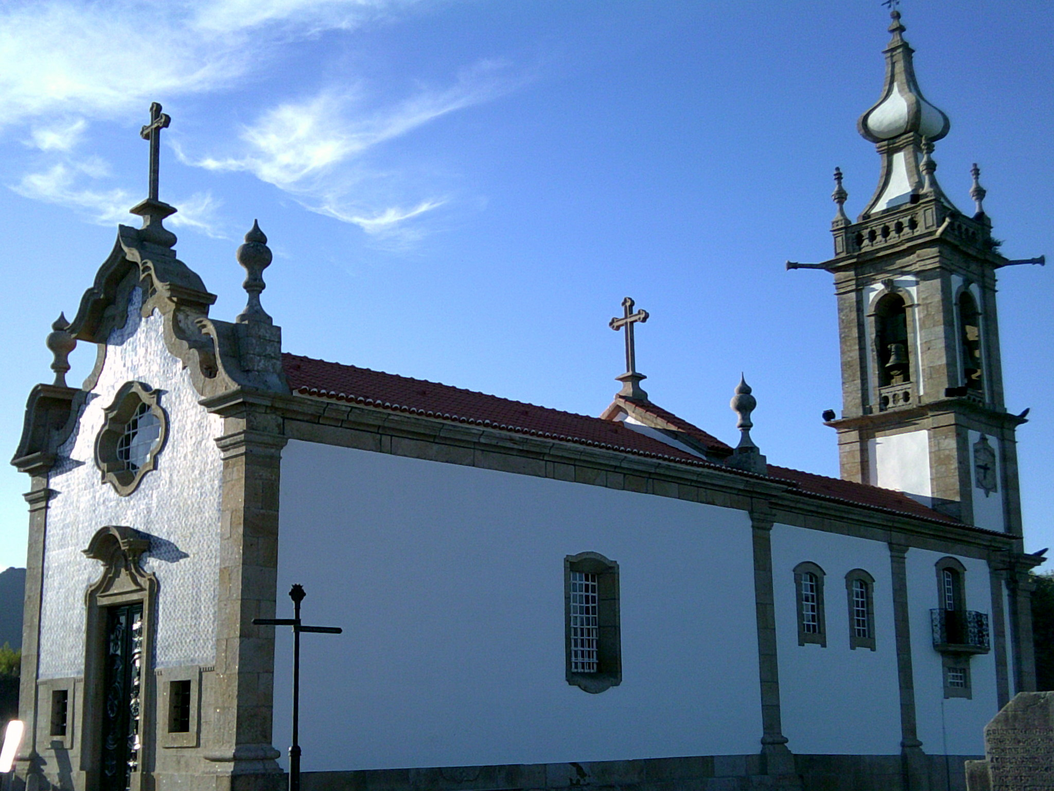 Igreja de Santo António da Torre Velha, freguesia, cidade e concelho de Ponte de Lima, concelho de Viana do Castelo, Portugal.